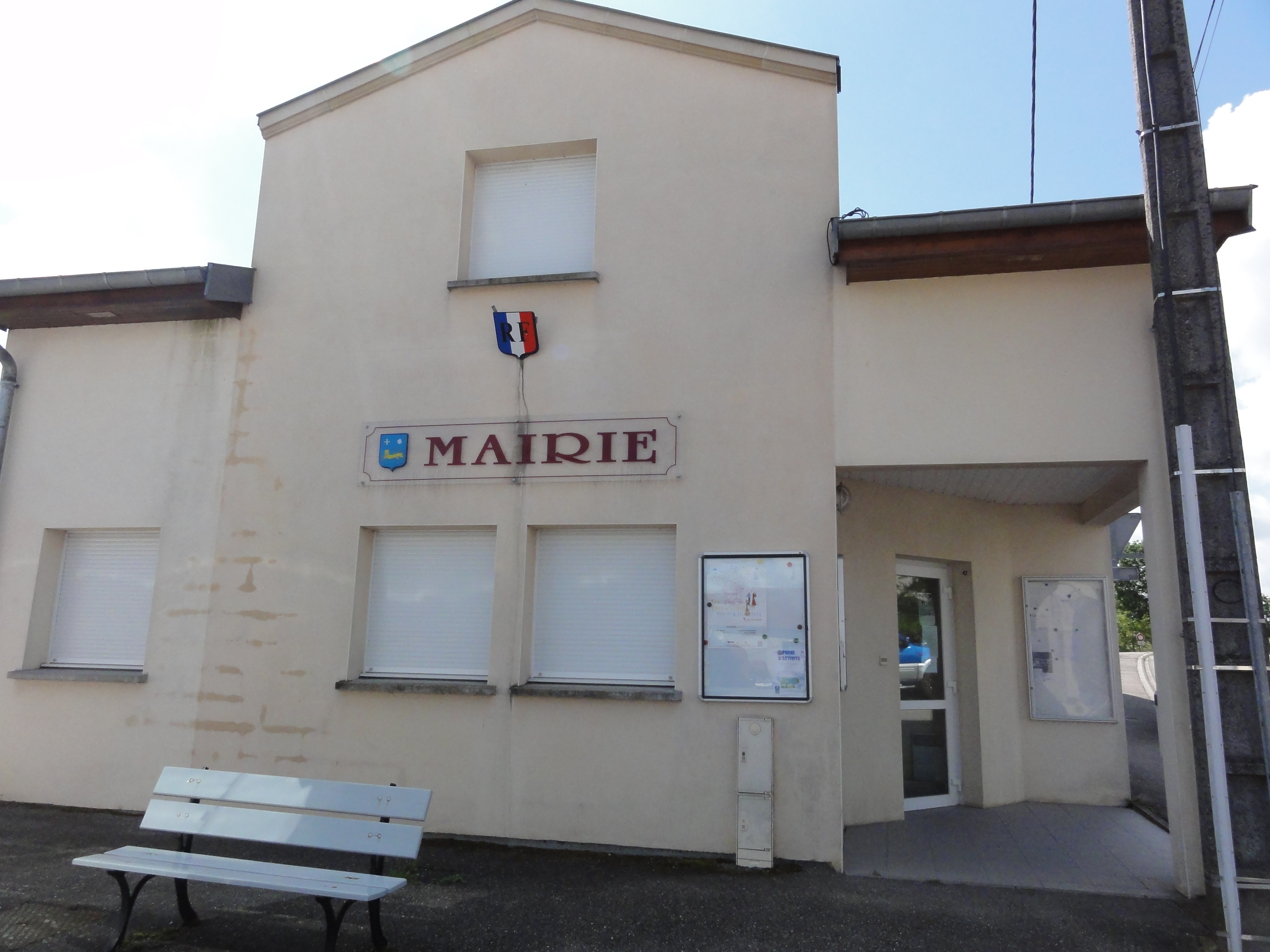 Sionviller (M-et-M) mairie